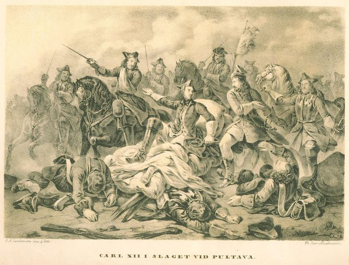 Carl XII i slaget vid Pultava. Från "Teckningar ur Sveriges historia" av Carl Andreas Dahlström.